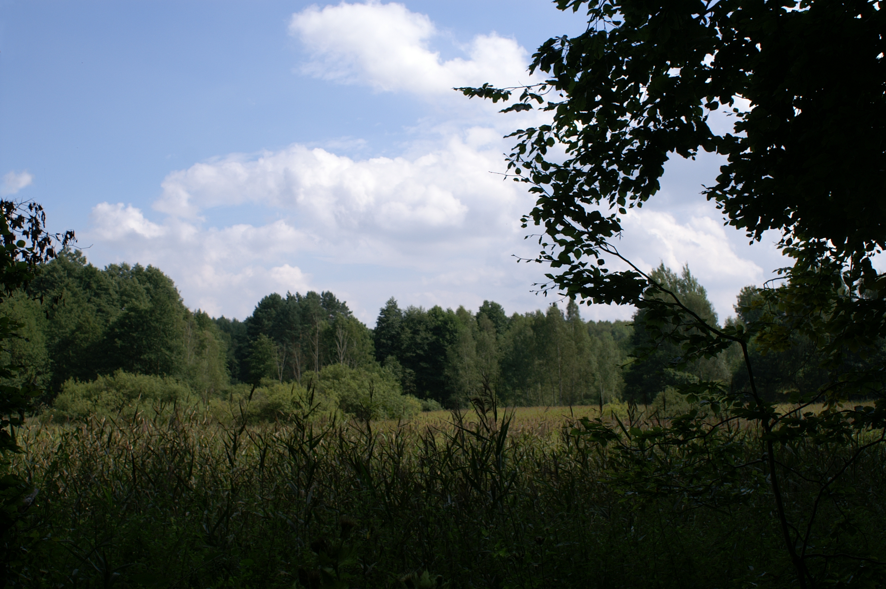 Blick ins Biesenthaler Becken, Schilfröhricht